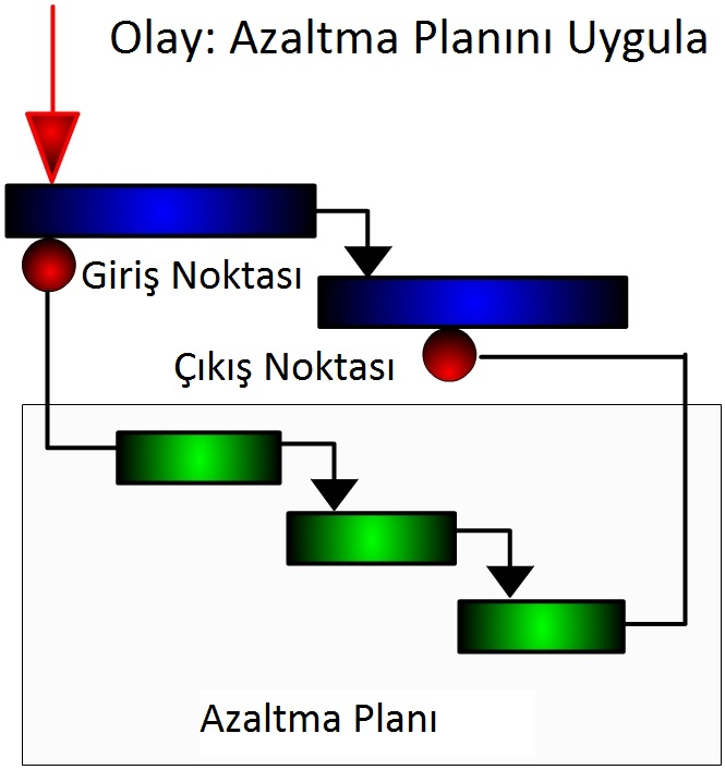 Azaltma Planı